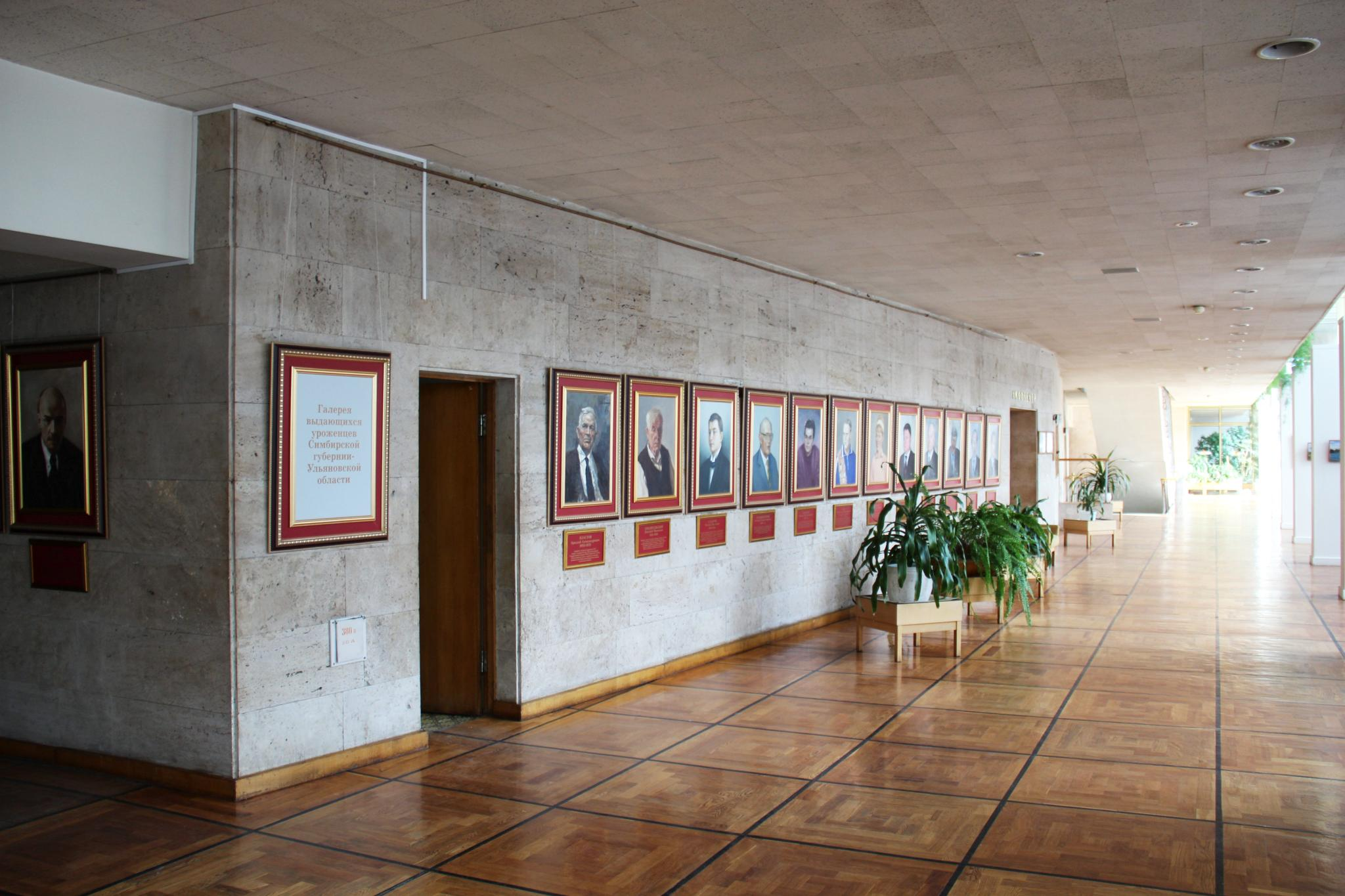 Фойе киноконцертного зала Мемориального центра в Ульяновске